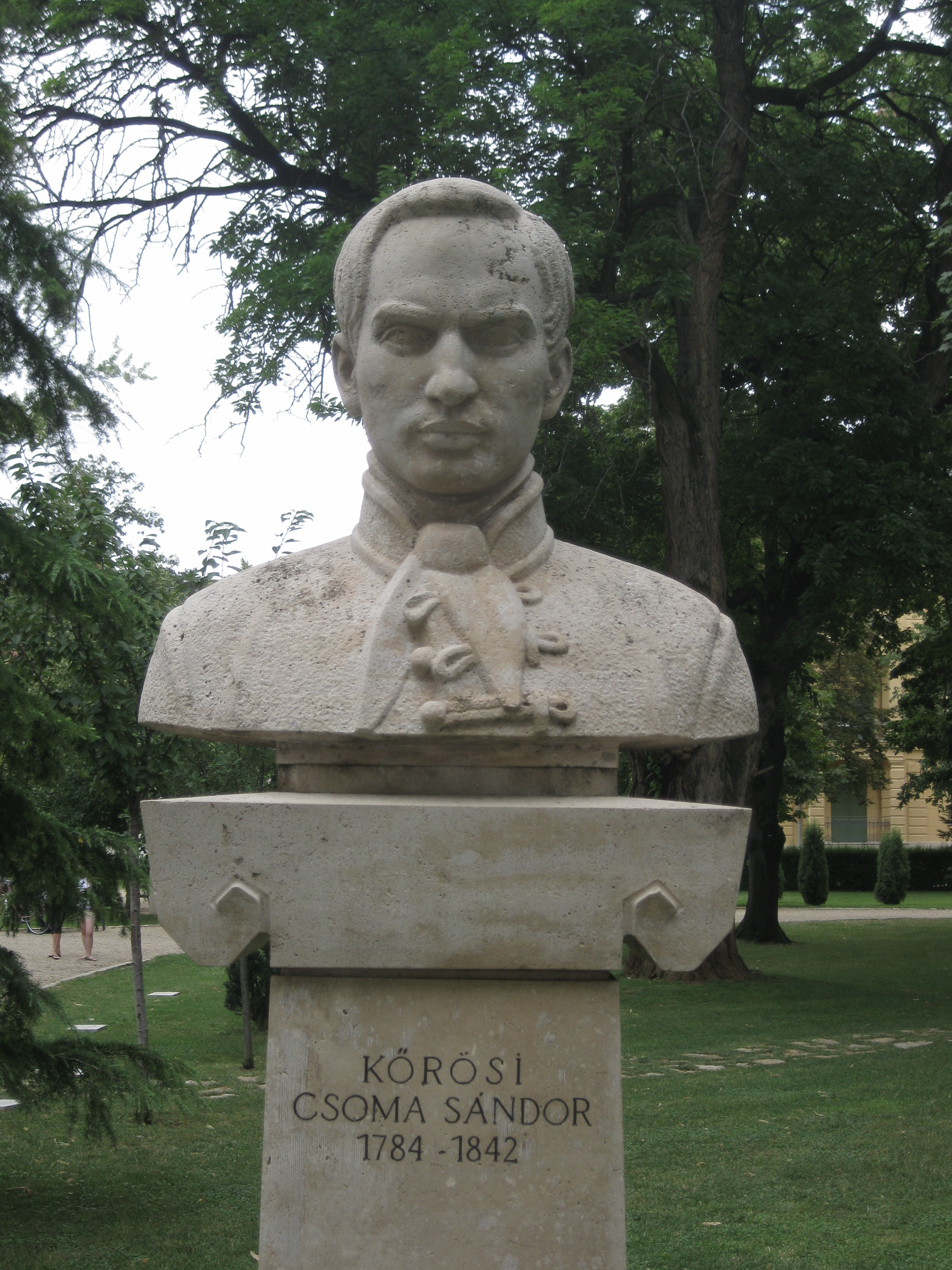 Kőrösi Csoma Sándor mellszobra Balatonfüreden a Tagore (sétányon) parkban